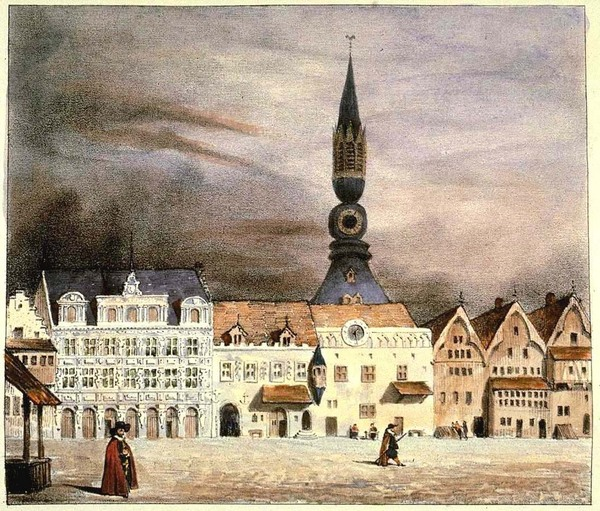 Ancien Hôtel de Ville et beffroi. Date : circa 1830 Dimensions : 21,1 x 14 cm. – Technique : lithographie